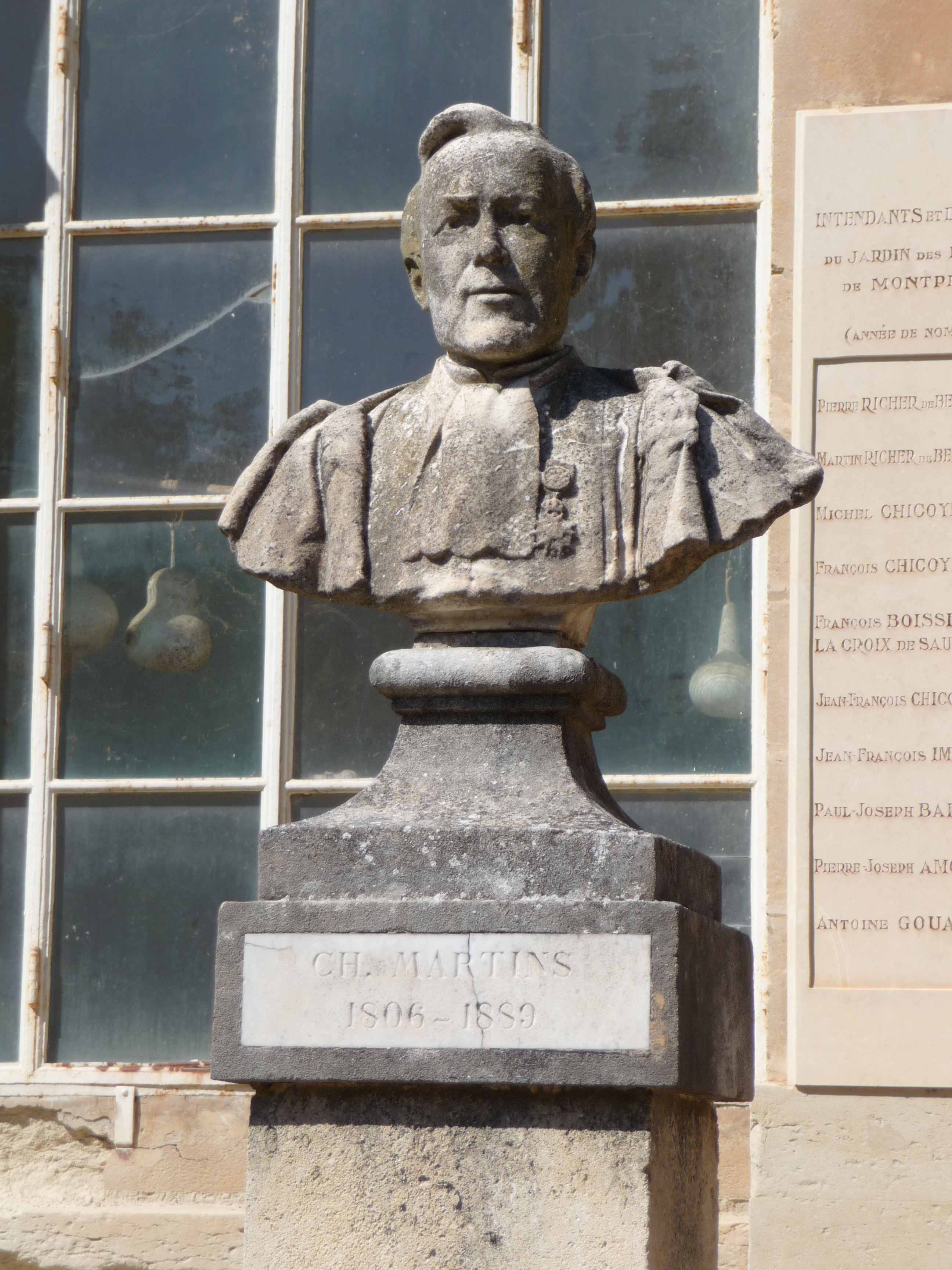 Bust de Charles Frédéric Martins al Jardí Botànic de Montpeller .